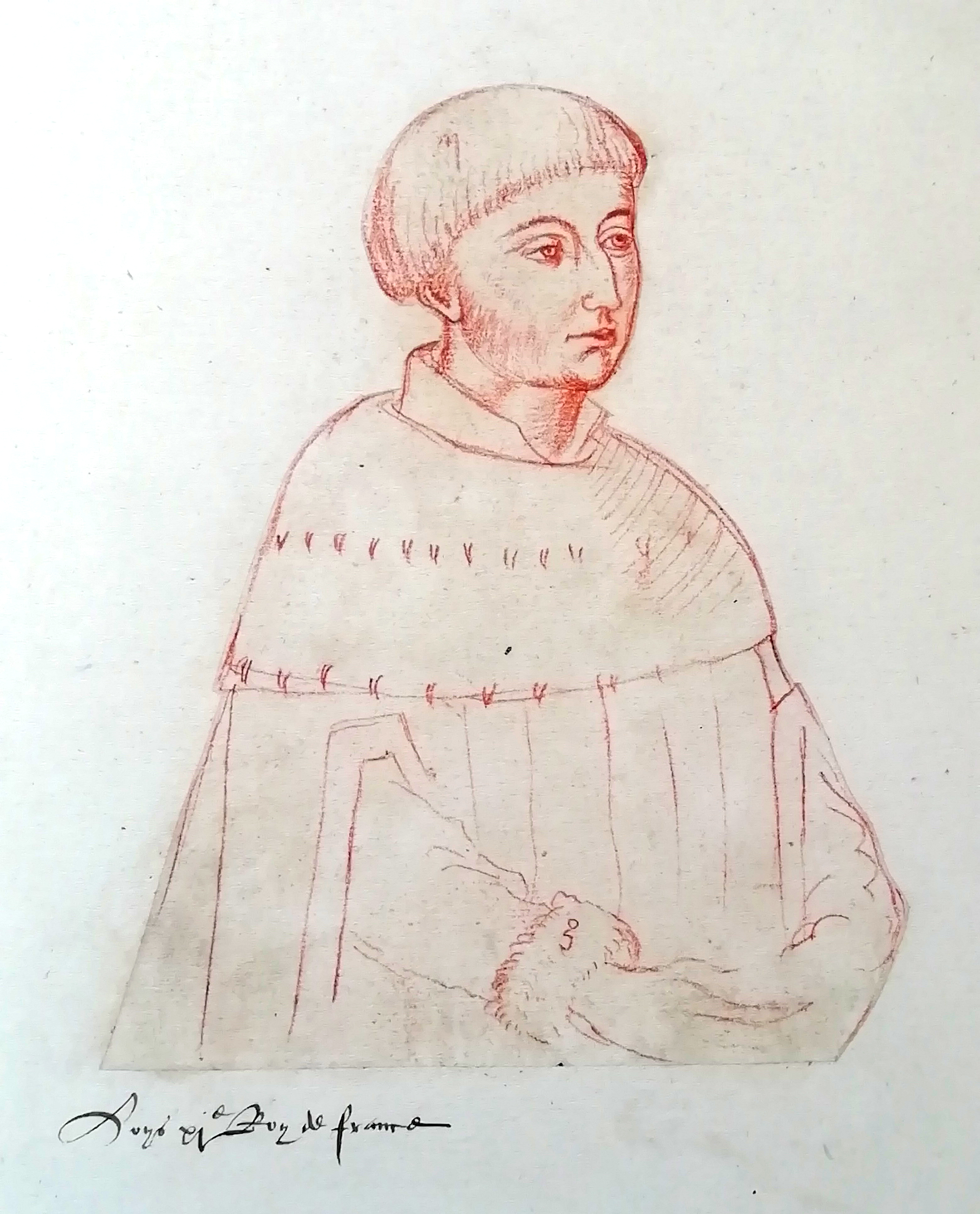 Portrait à la sanguine sur pierre noire du dauphin Louis (futur Louis XI), Recueil d'Arras, folio 7, Bibliothèque municipale d'Arras.